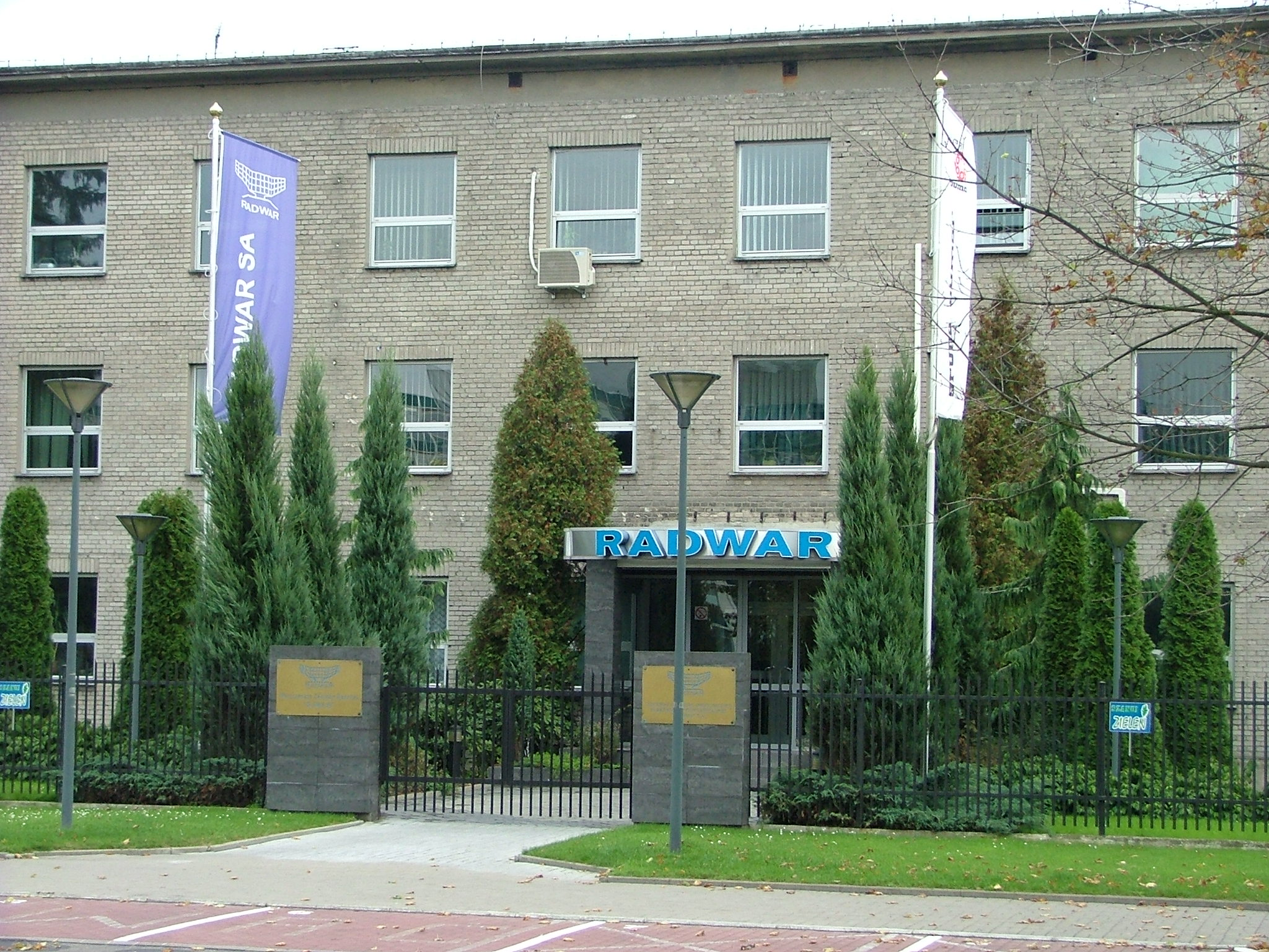 PL, Warsaw, Poland, Praga Południe, Ostrobramska Street, Radwar SA, ul. Poligonowa 1